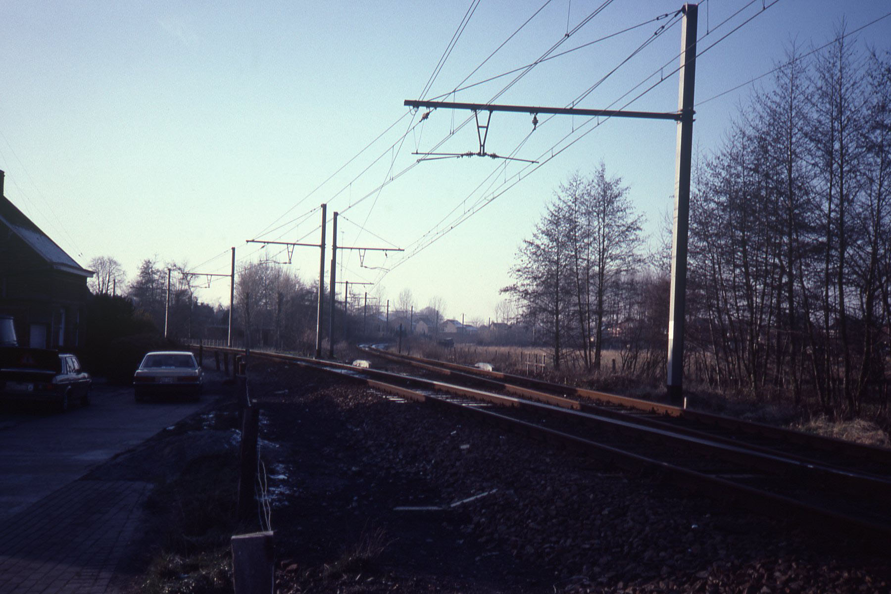 De aftakking 13/1 richting Duffel bij Kontich. Rechts de spoorlijn 13 naar Kontich station